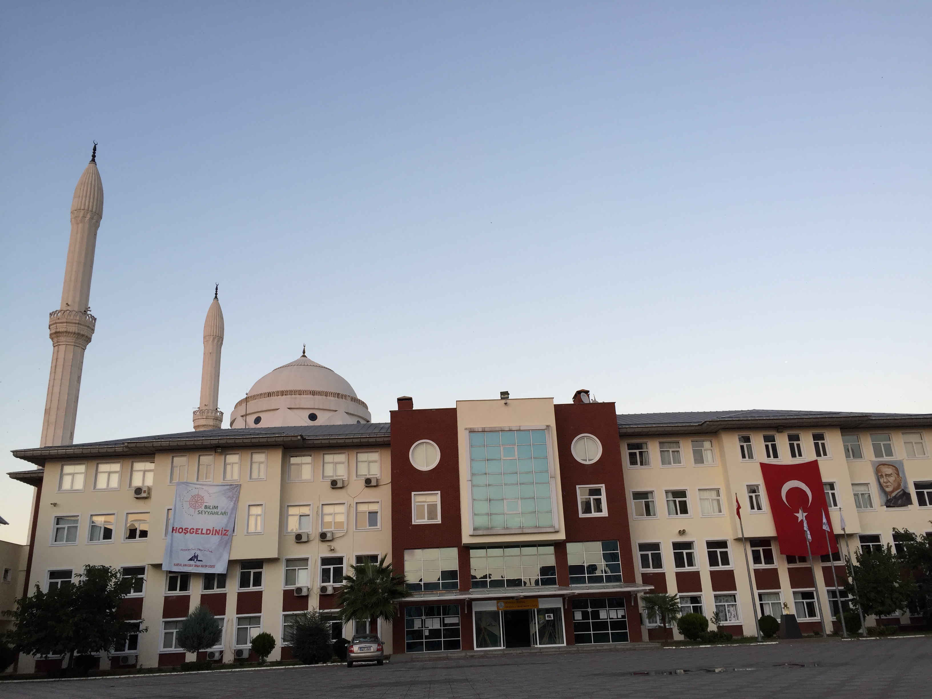 Kartal Anadolu İmam Hatip Lisesi A blok önden görünüşü